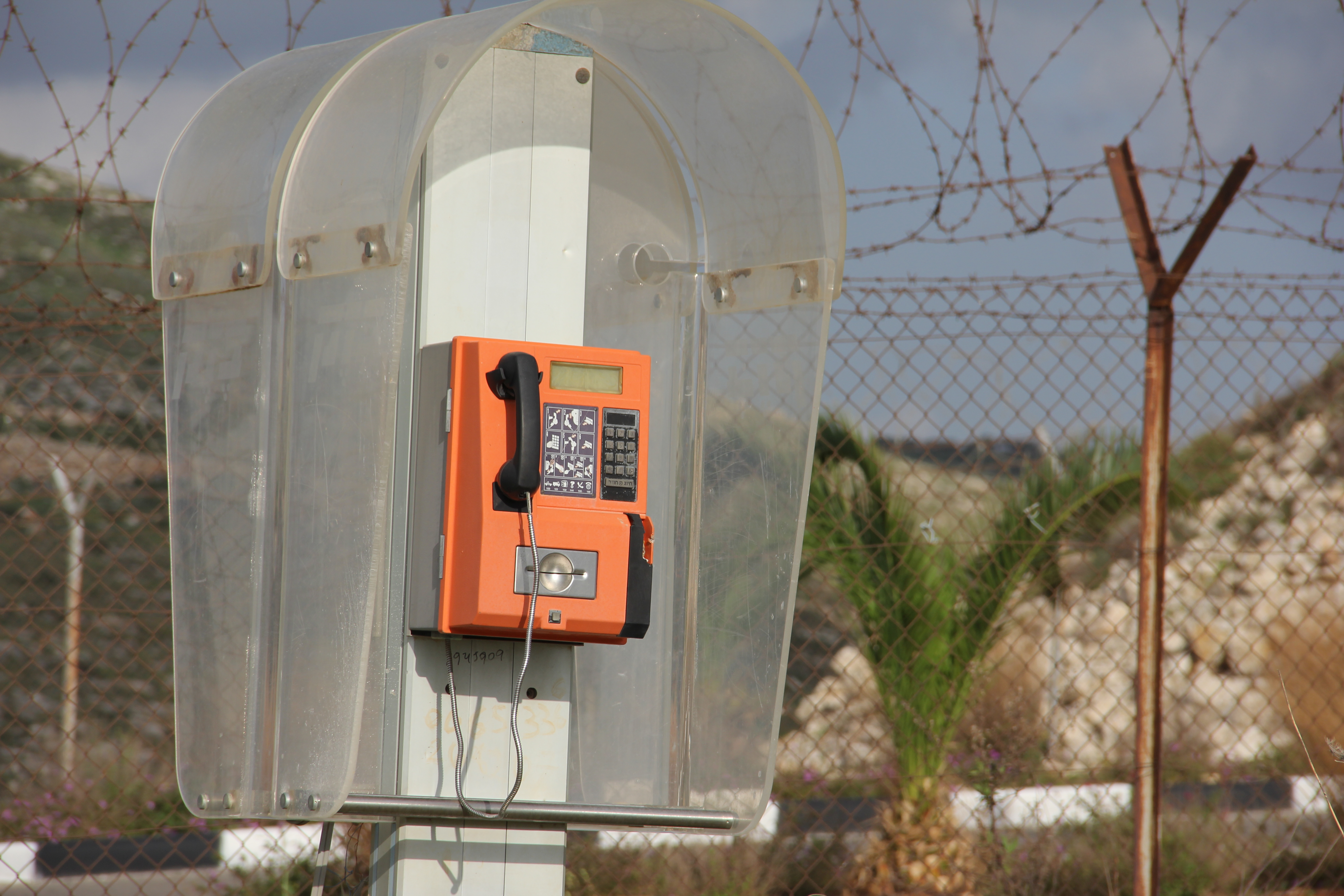 טלפון ציבורי במוצב צבאי